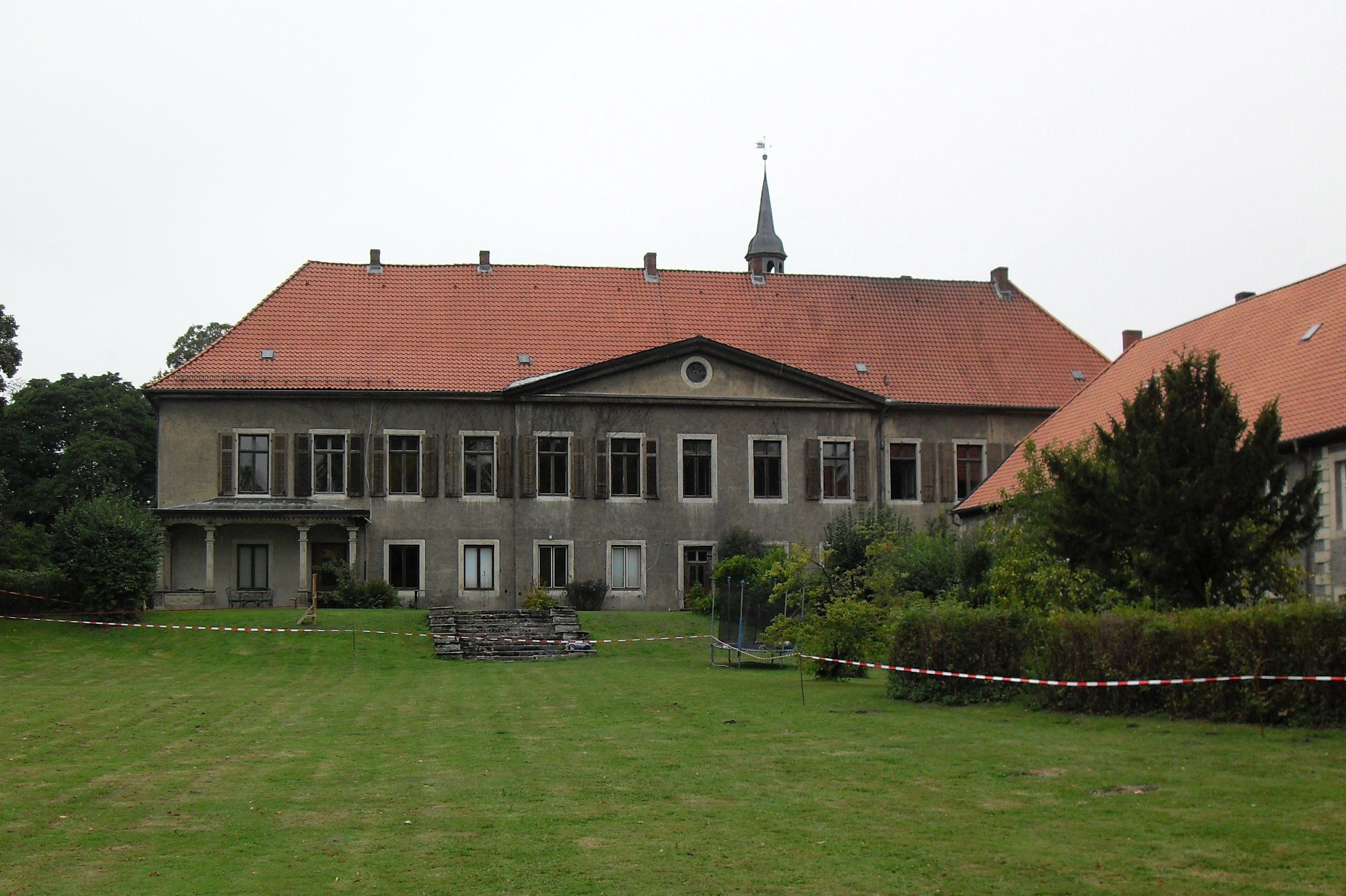 Rittergut Lucklum, Niedersachsen, Ansicht vom Gutspark